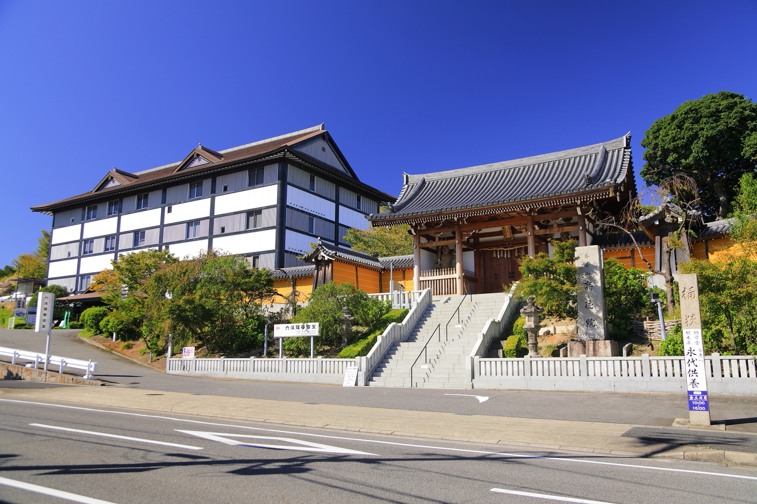 香華山高徳院外観（豊明市栄町南舘、2018年（平成30年）10月）